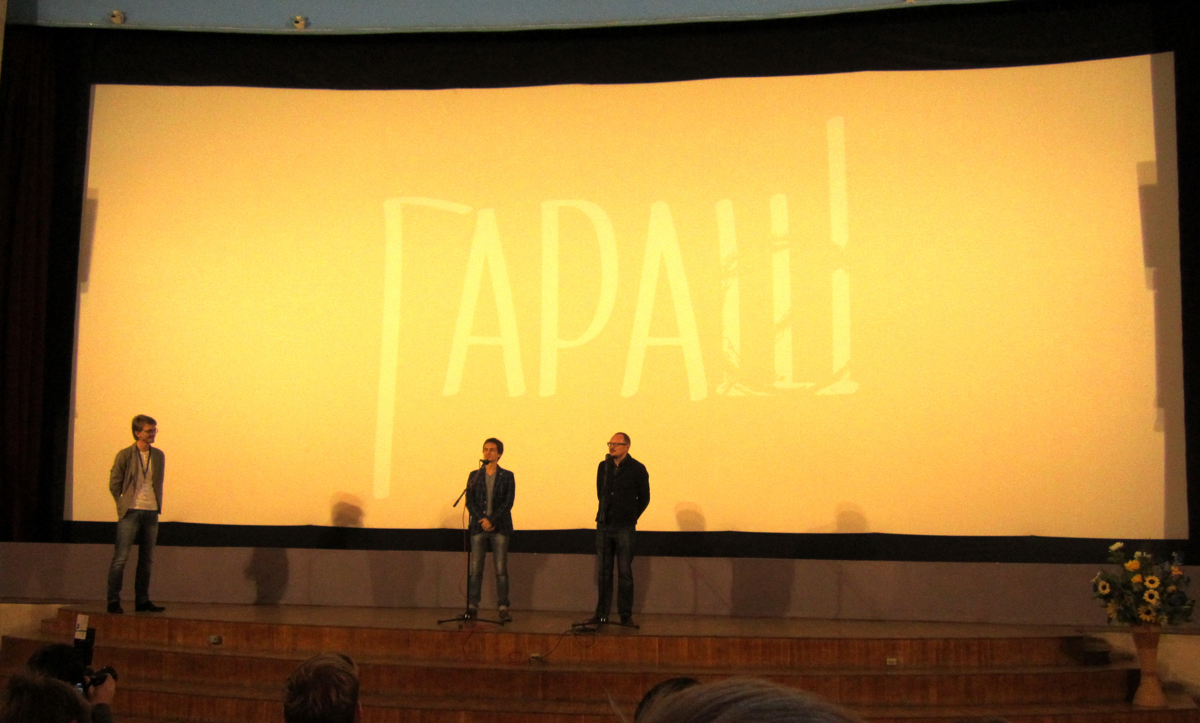 Прэм'ерны паказ фільма "ГараШ". Мінск, кінафестываль "Лістапад". Выступ прадзюсара фільма Дзмітрыя Фрыгі і рэжысёра-сцэнарыста Андрэя Курэйчыка